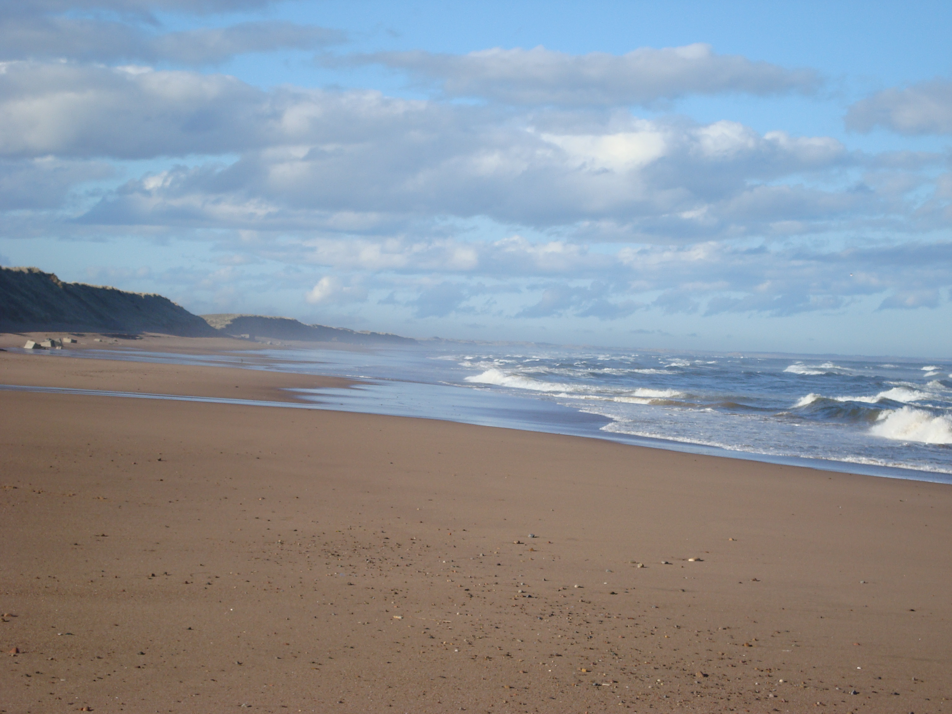 Aberdeen